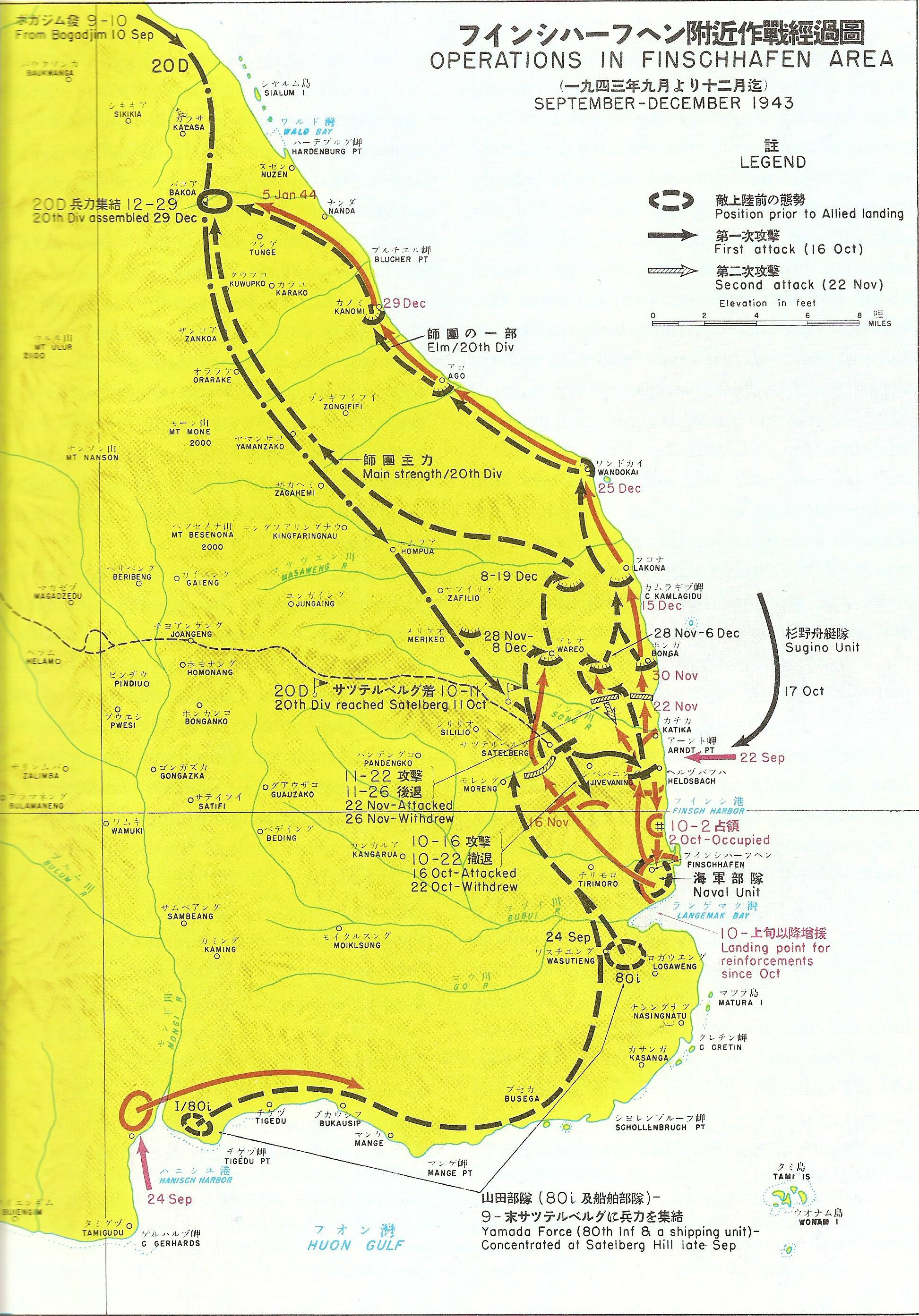 Operations in Finschhafen Area, September-December 1943